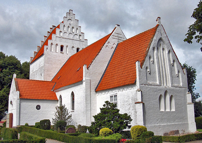 fra sydøst